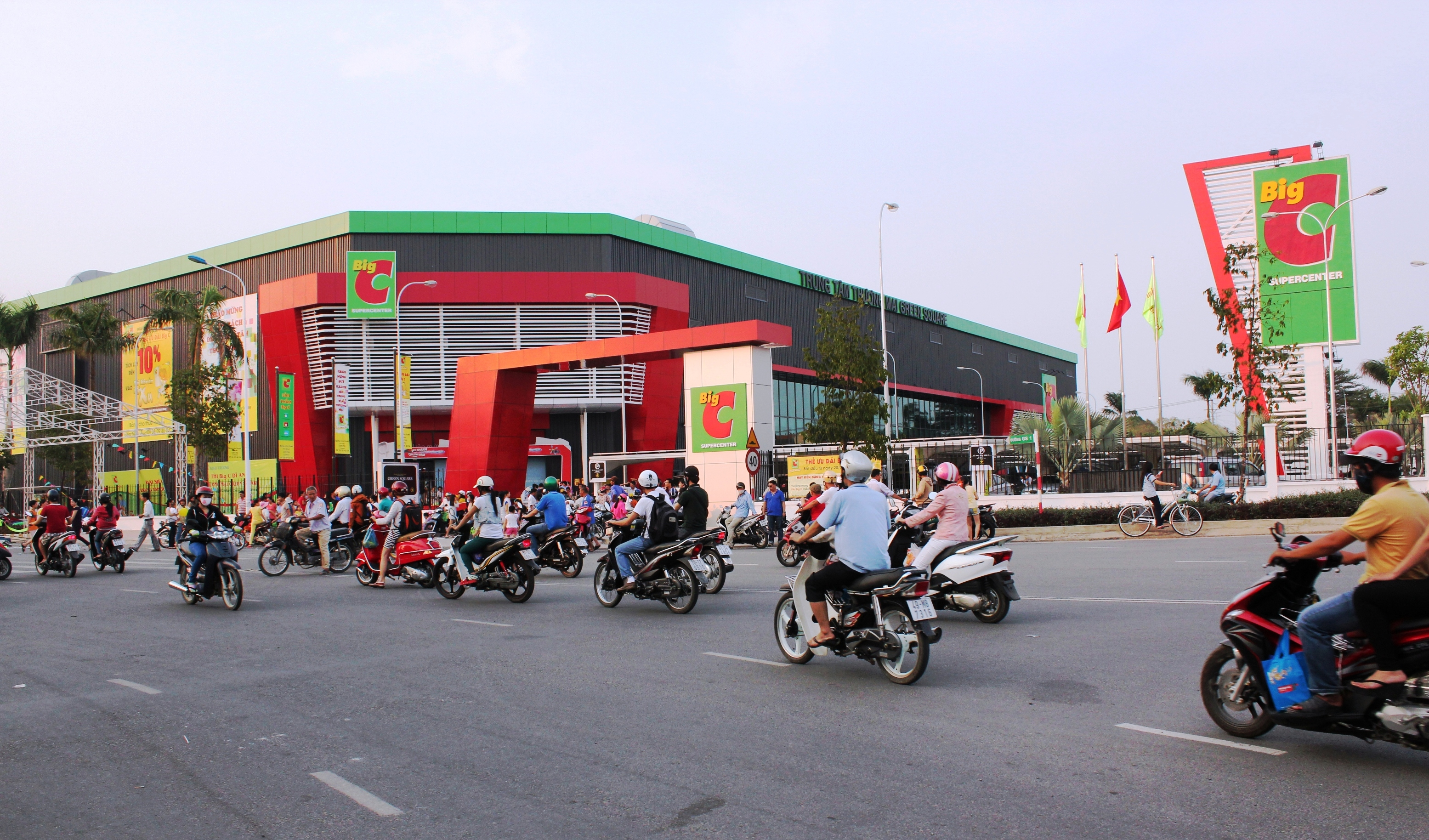 Supermarché Big C au Vietnam